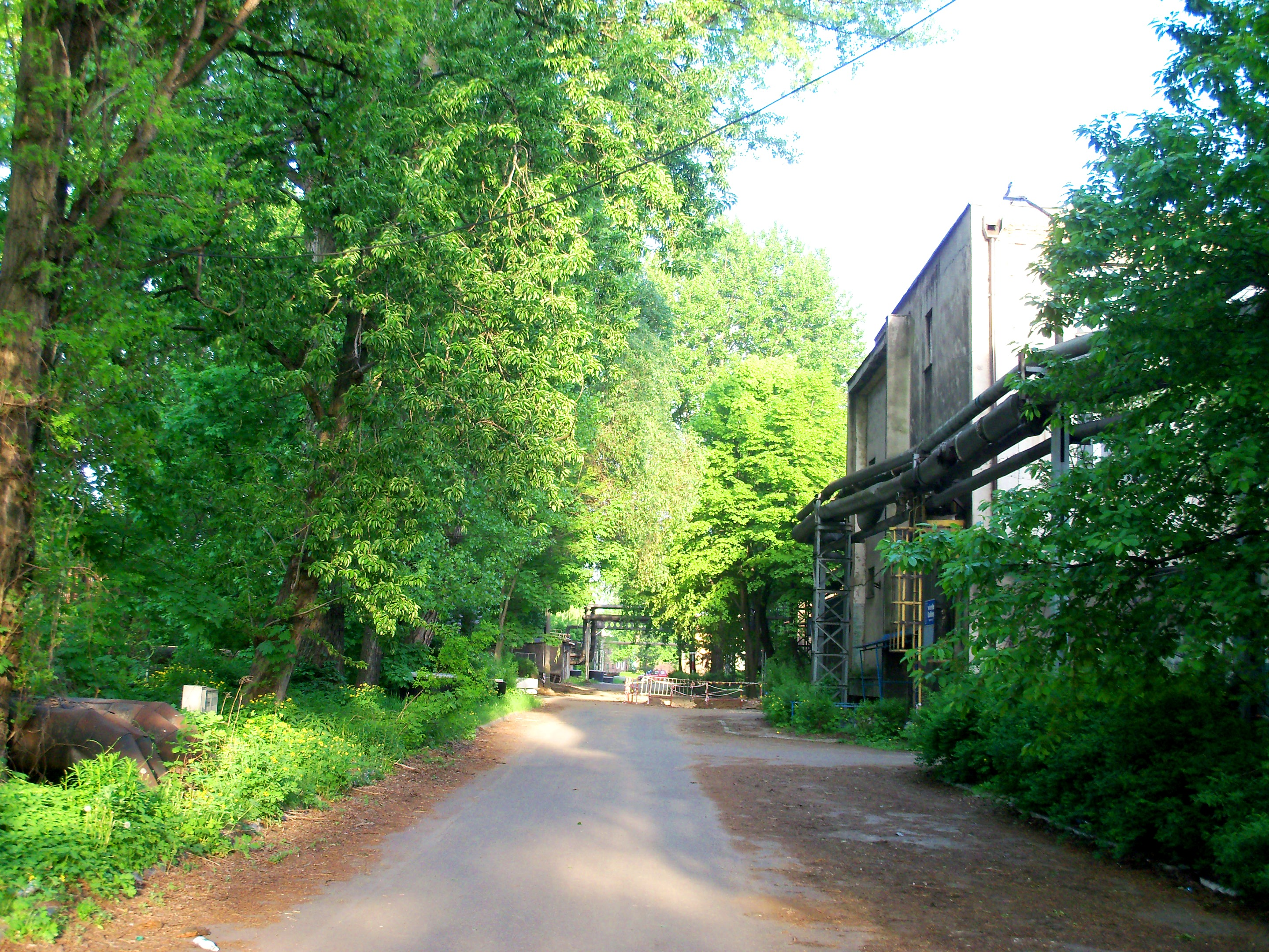 Huta Baildon w Katowicach